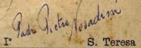 Assinatura de Pietro Nosadini na primeira edição do jornal Il Colono Italiano.